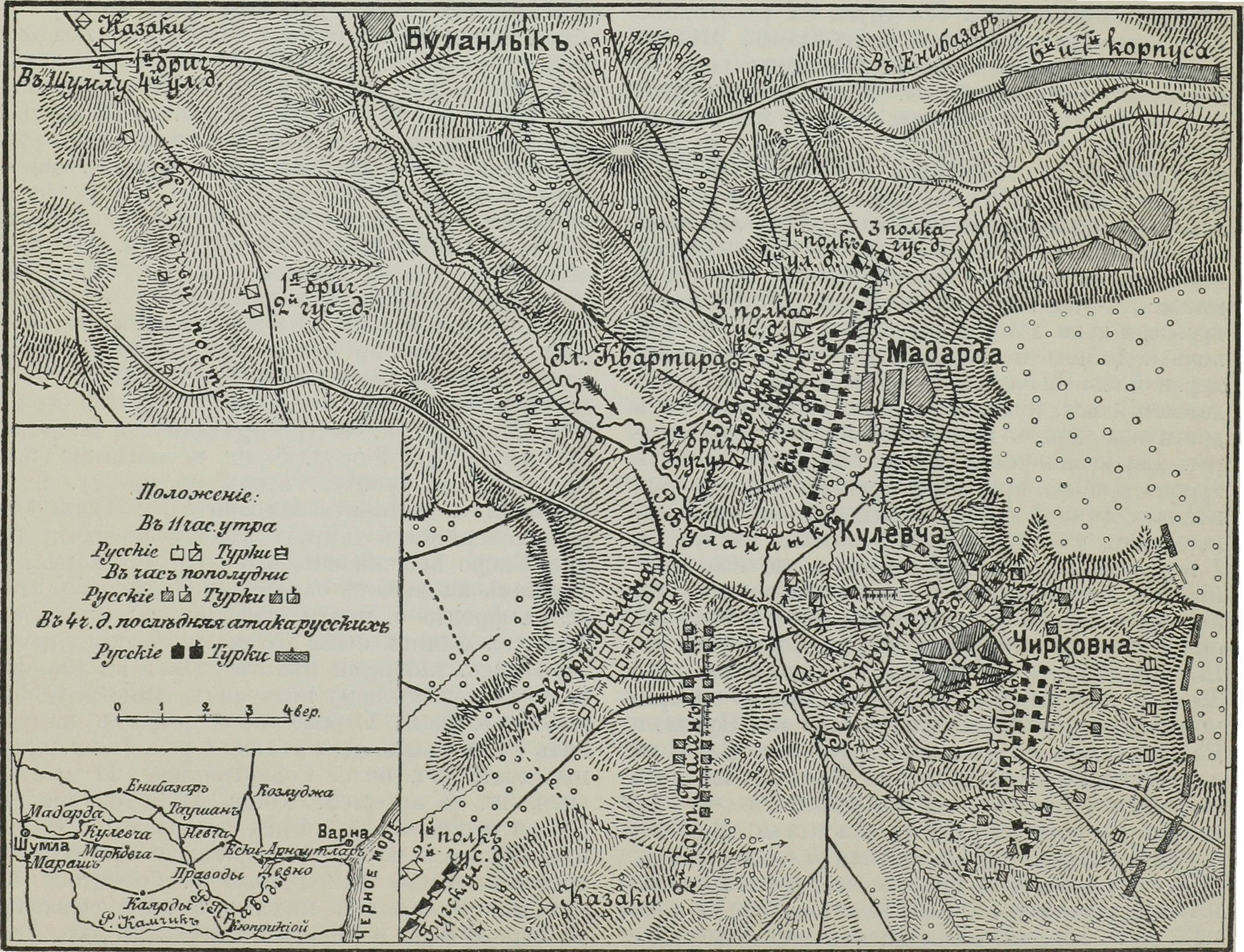 Схема сражения у кулевечей из военной энциклопедии 1911-14 годов